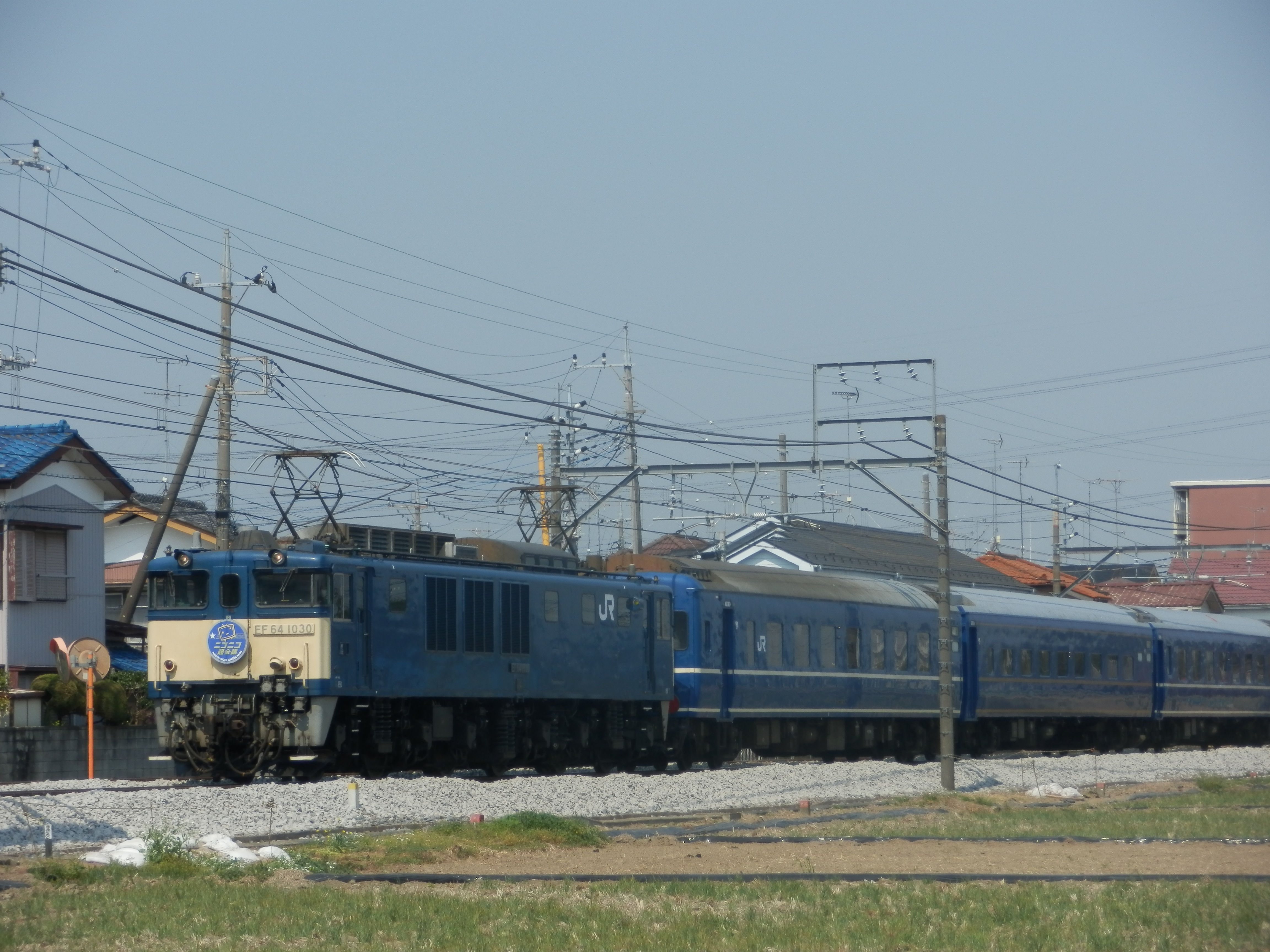 2014年4月26日運転のニコニコ超会議号。